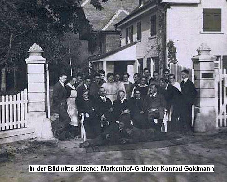 Der Markenhof war ein Hachschara-Lehrgut. Seine Absolventen gründeten in Palästina den Kibbuz Beth Sera (Beit Zera)